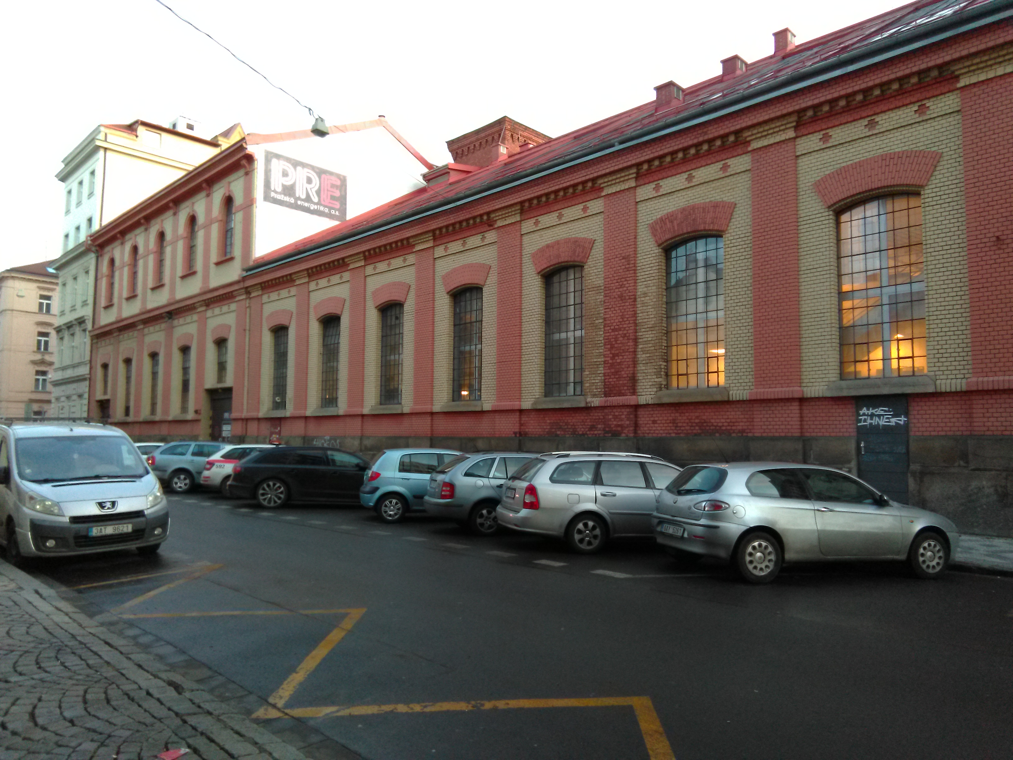 Svornosti 19 (č.p. 952 a 3199), Praha 5-Smíchov. Budova Pražské energetiky a.s. a bývalá smíchovská elektrárna.